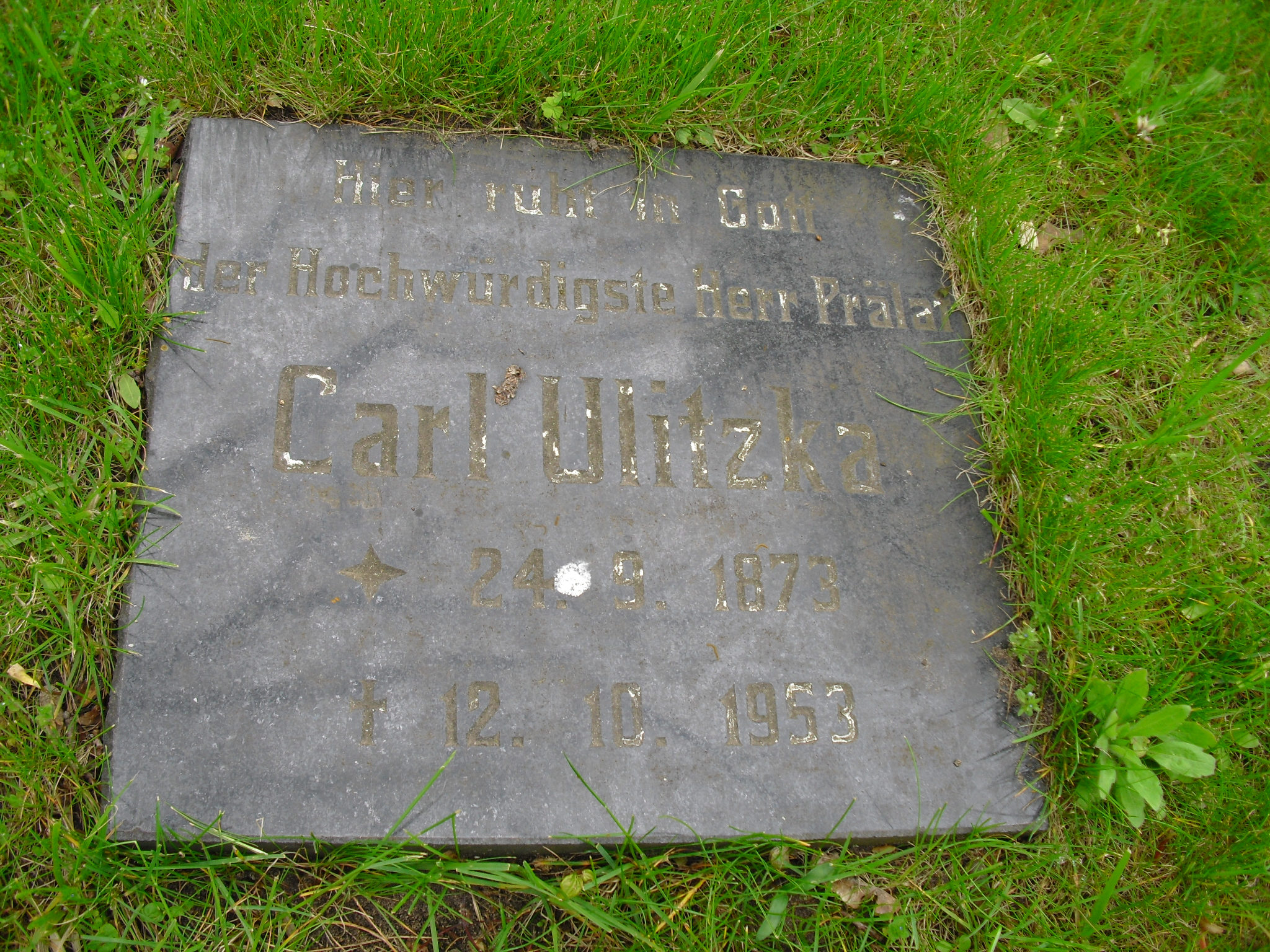 "Hier ruht in Gott der Hochwürdigste Herr Prälat Carl Ulitzka", auf dem Karlshorster und Neuen Friedrichsfelder Friedhof in Berlin-Karlshorst